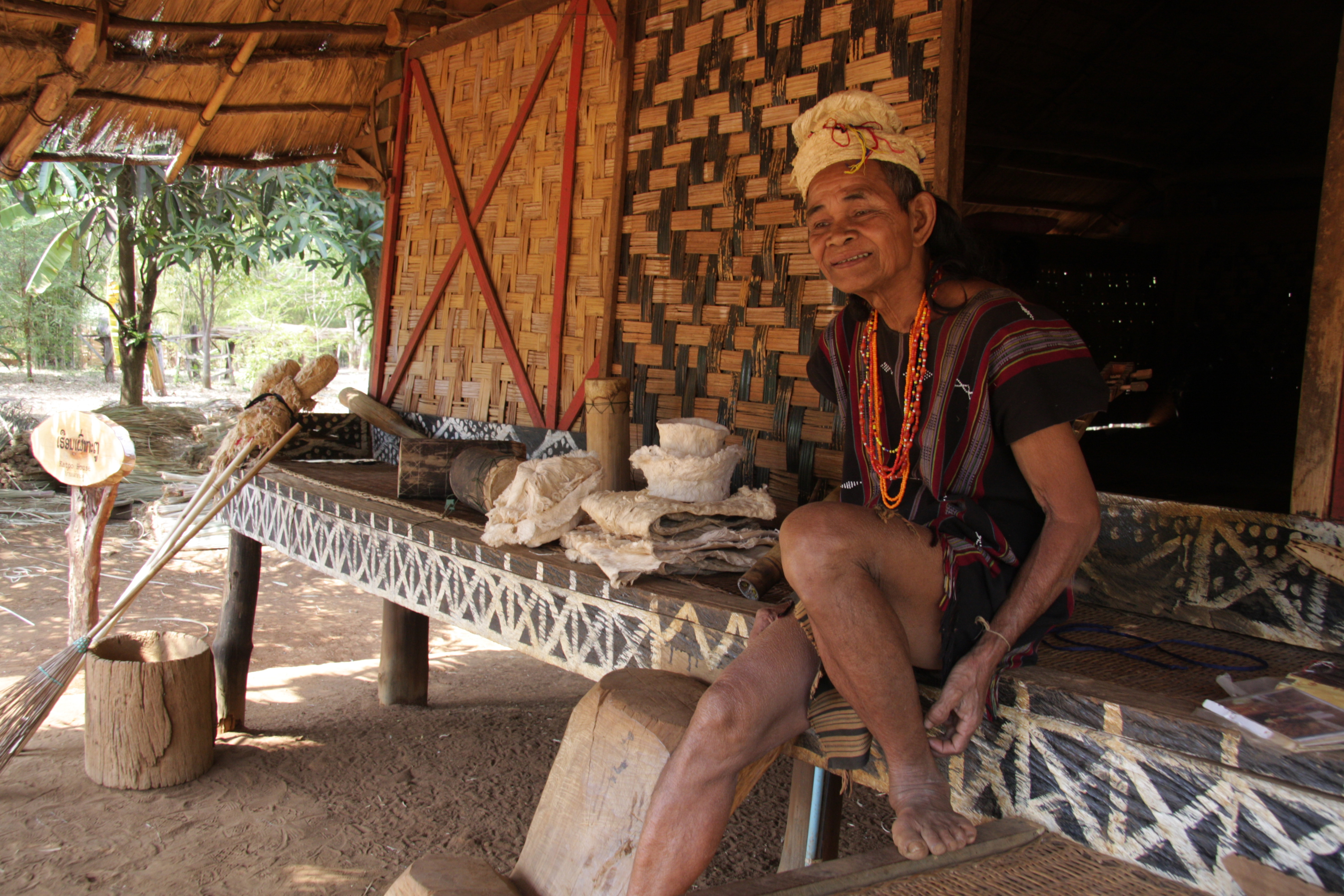 laos sud, Sekong, homme de l'ethnie katoo